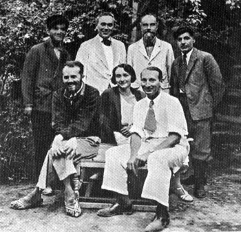 Photo de l'équipe de Ghirshman à Sialk dans les années 1920.